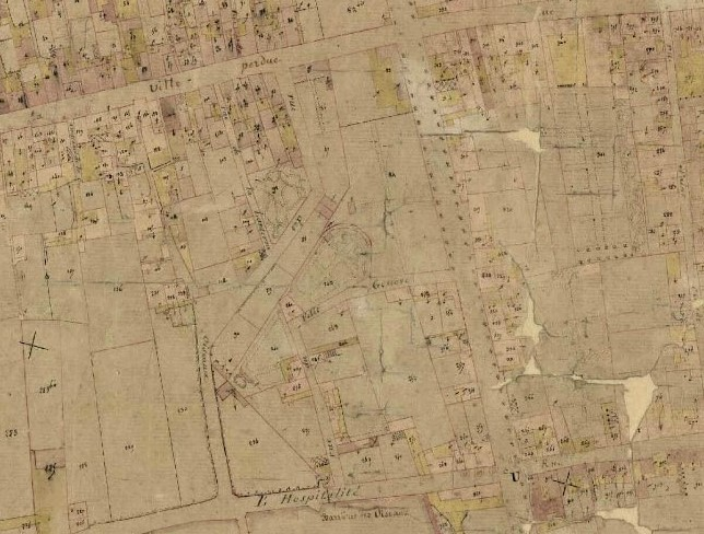 Extrait d'un plan de Tours (rue des Oiseaux) sur le cadastre napoléonien